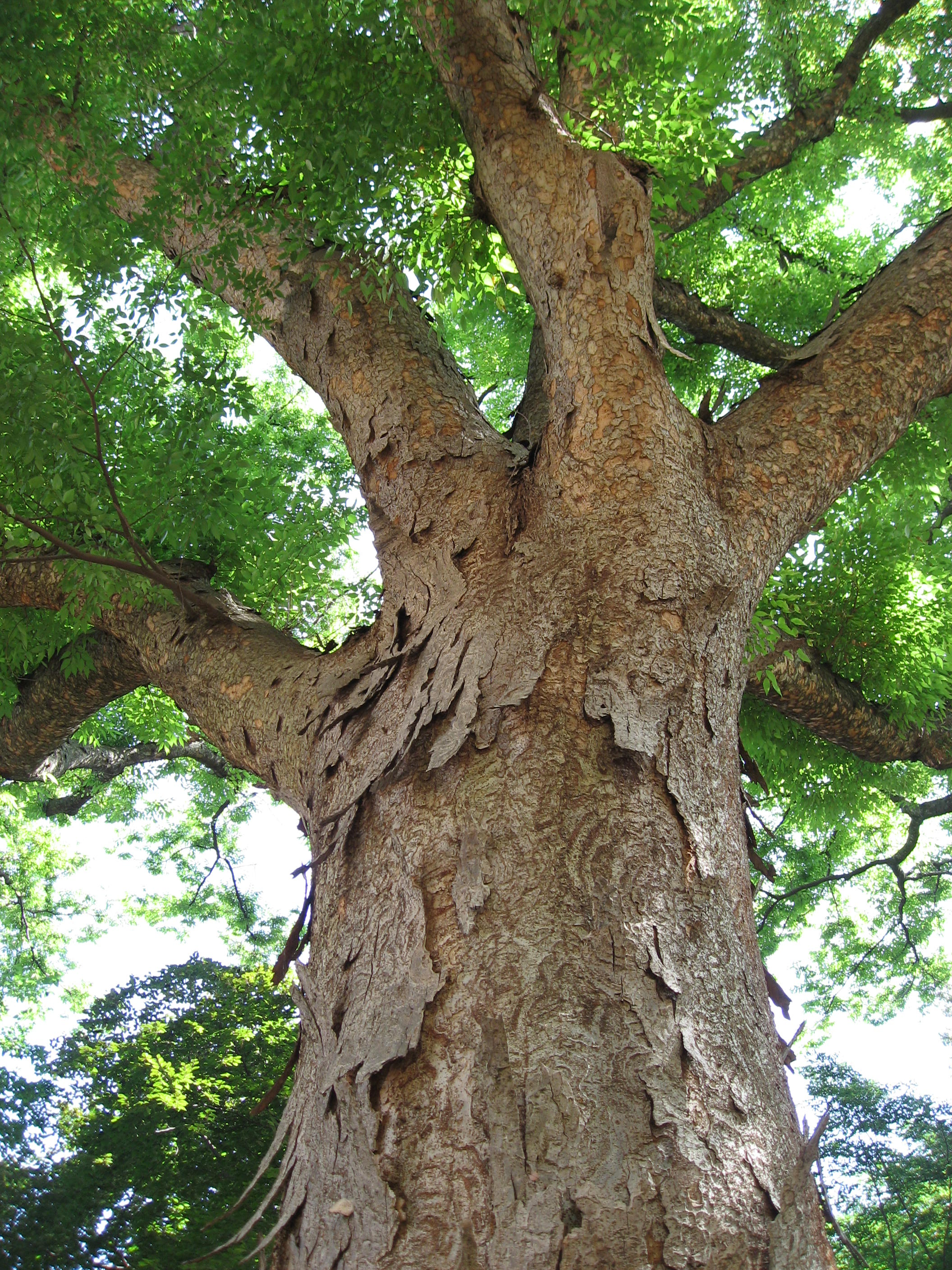 Zelkova serrata in Giardino dei Semplici di Firenze Map: 43° 46' 45" N 11° 15' 39" E